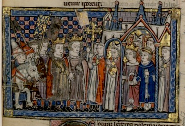 Assemblée d'Acre (1148)